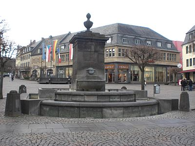 Marktbrunnen Mayen Frontansicht